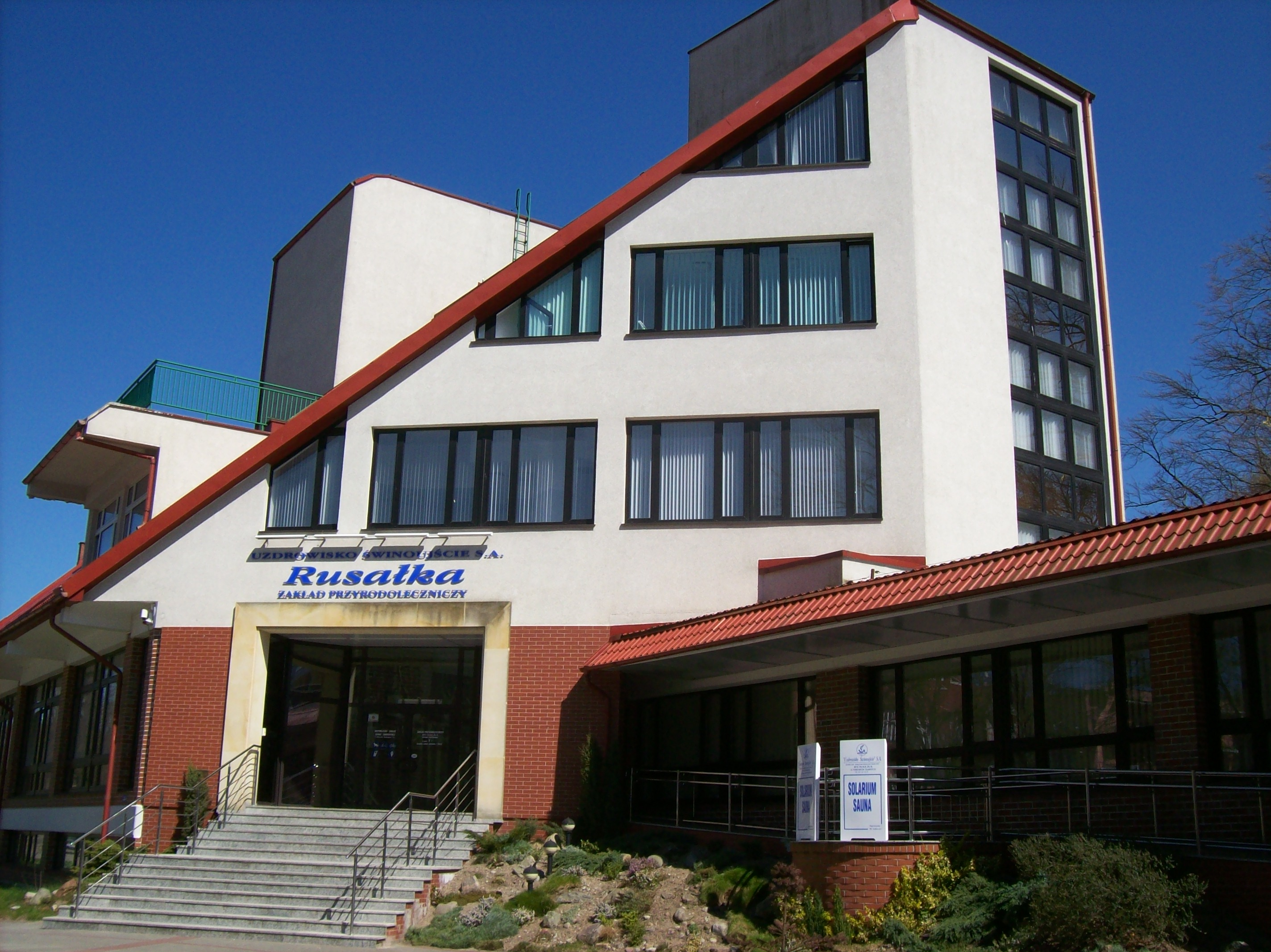 Uzdrowisko Świnoujście SA. Zakład Przyrodoleczniczy "Rusałka"